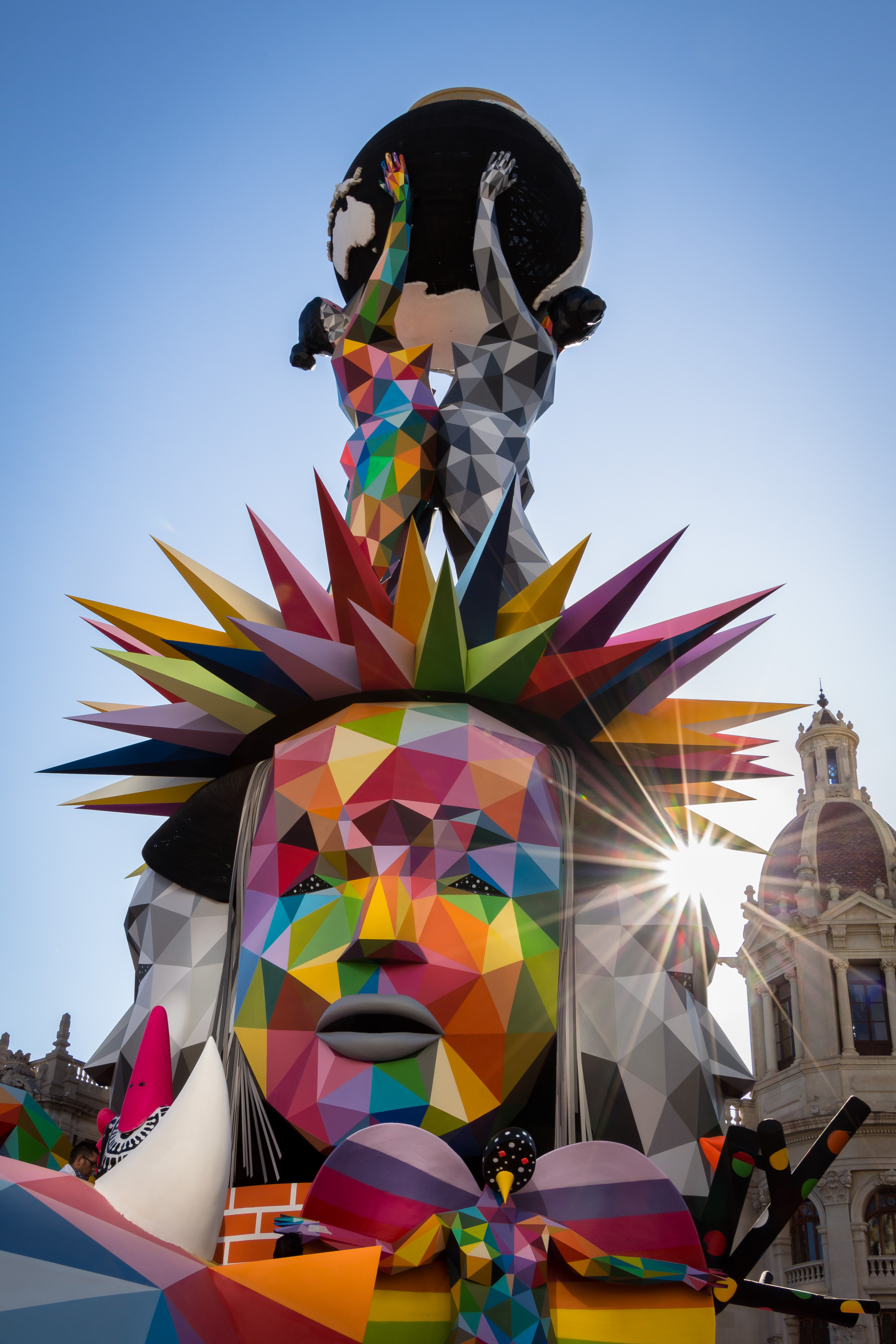 Escena del montaje de la Falla del Ayuntamiento en 2018, diseñada por el artista Okuda. This is a photography of a Folklore festival in Spain (Wikidata id Q1143768).